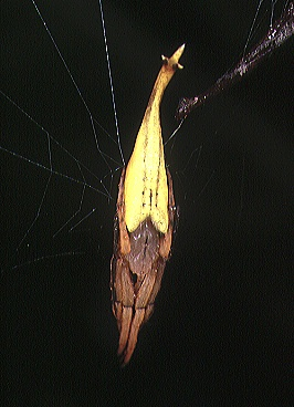 female Arachnura melanura from Okinawa.